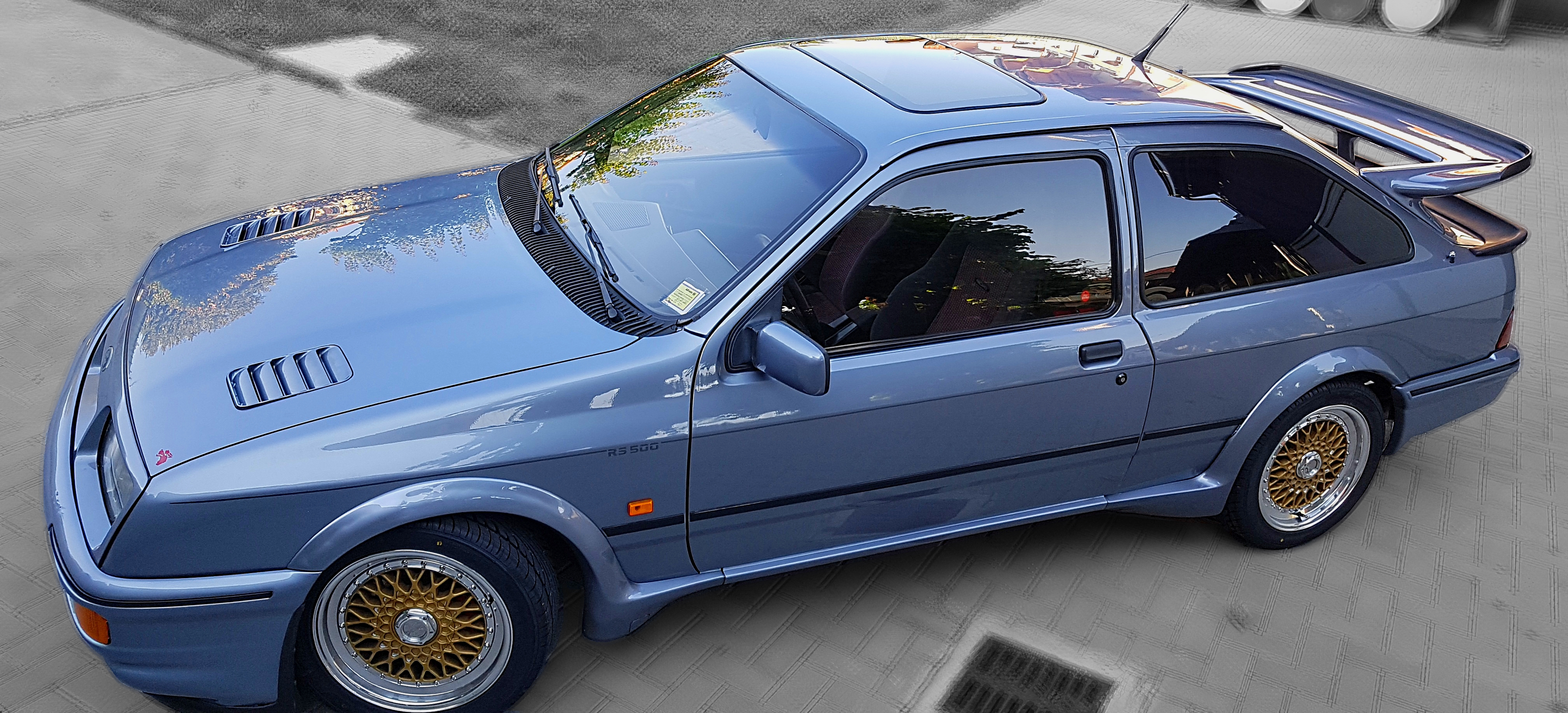 Le modifiche estetiche esterne con il kit dedicato.